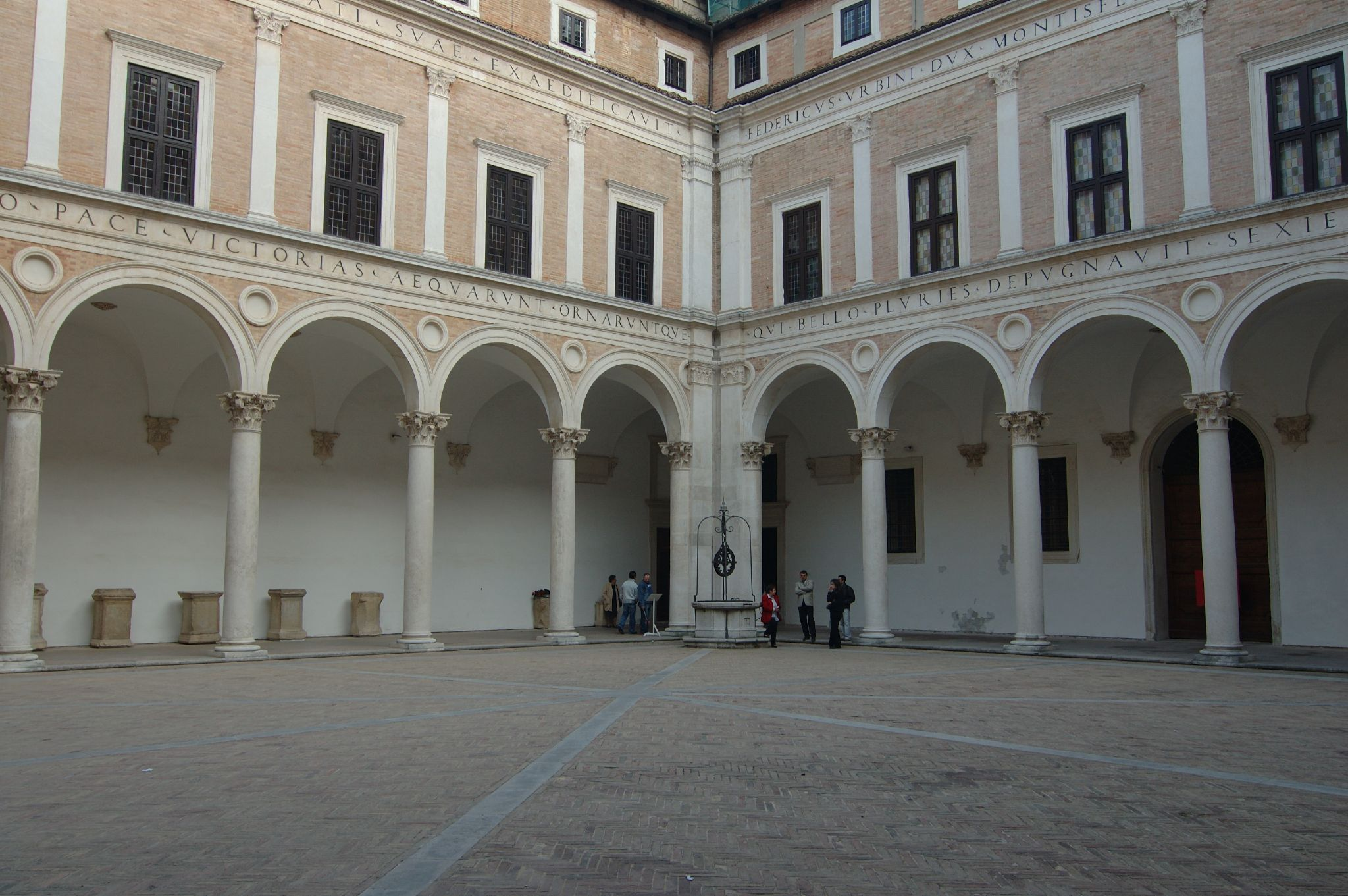 Urbino, Marche, Italia